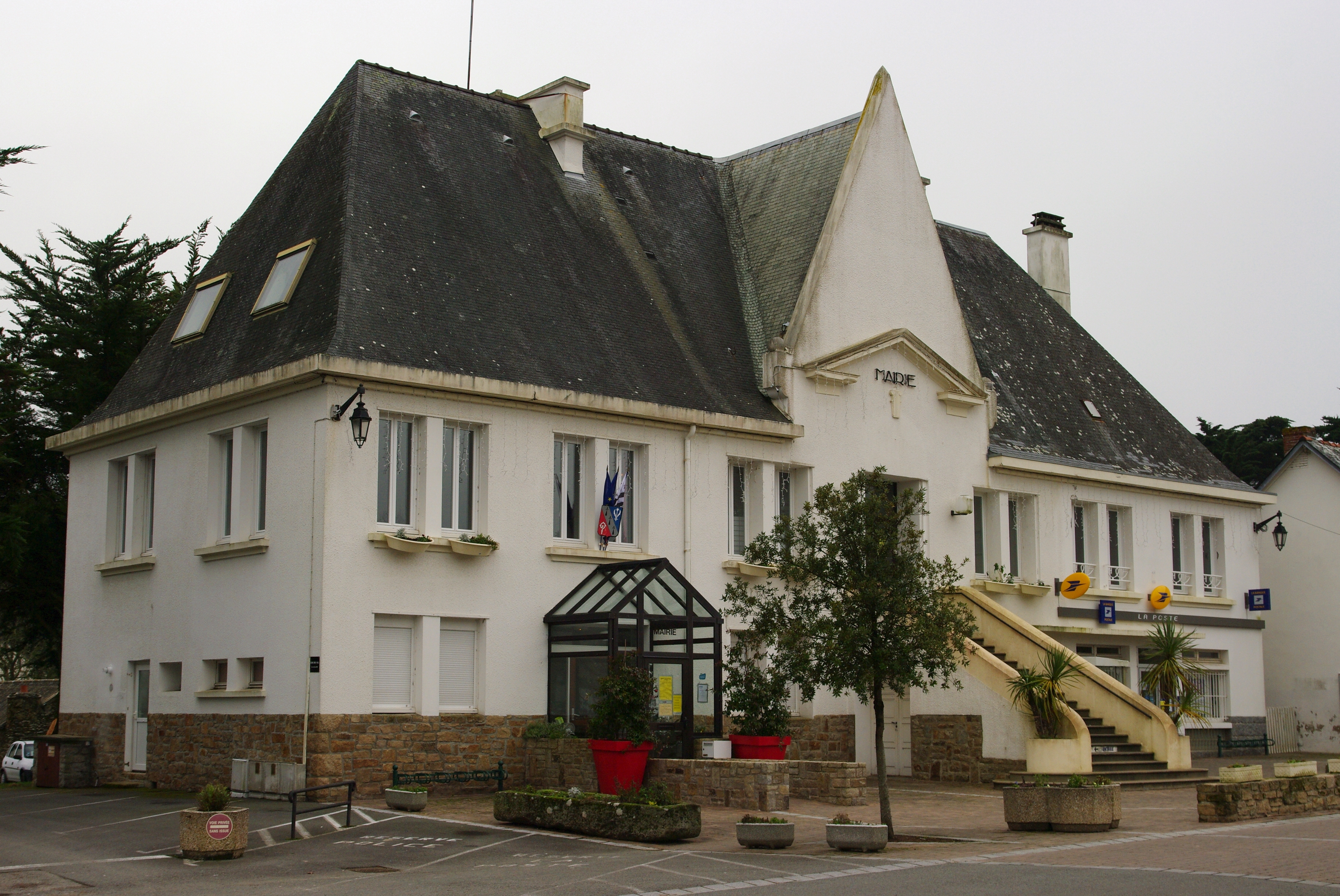 La mairie de saint Gildas de Rhuys, Morbihan.